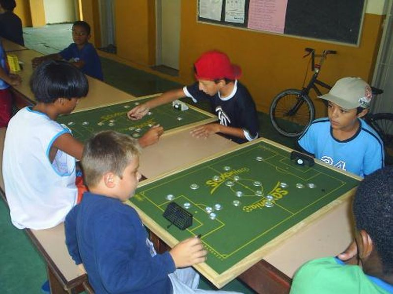 (portuguese) Crianças jogam futebol de botão, um hobby brasileiro